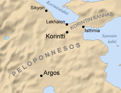 Korintin sota. Kartan tekemiseen käytetty DEMIS World Map Serveriä jonka tuottamat kartat ovat PD.